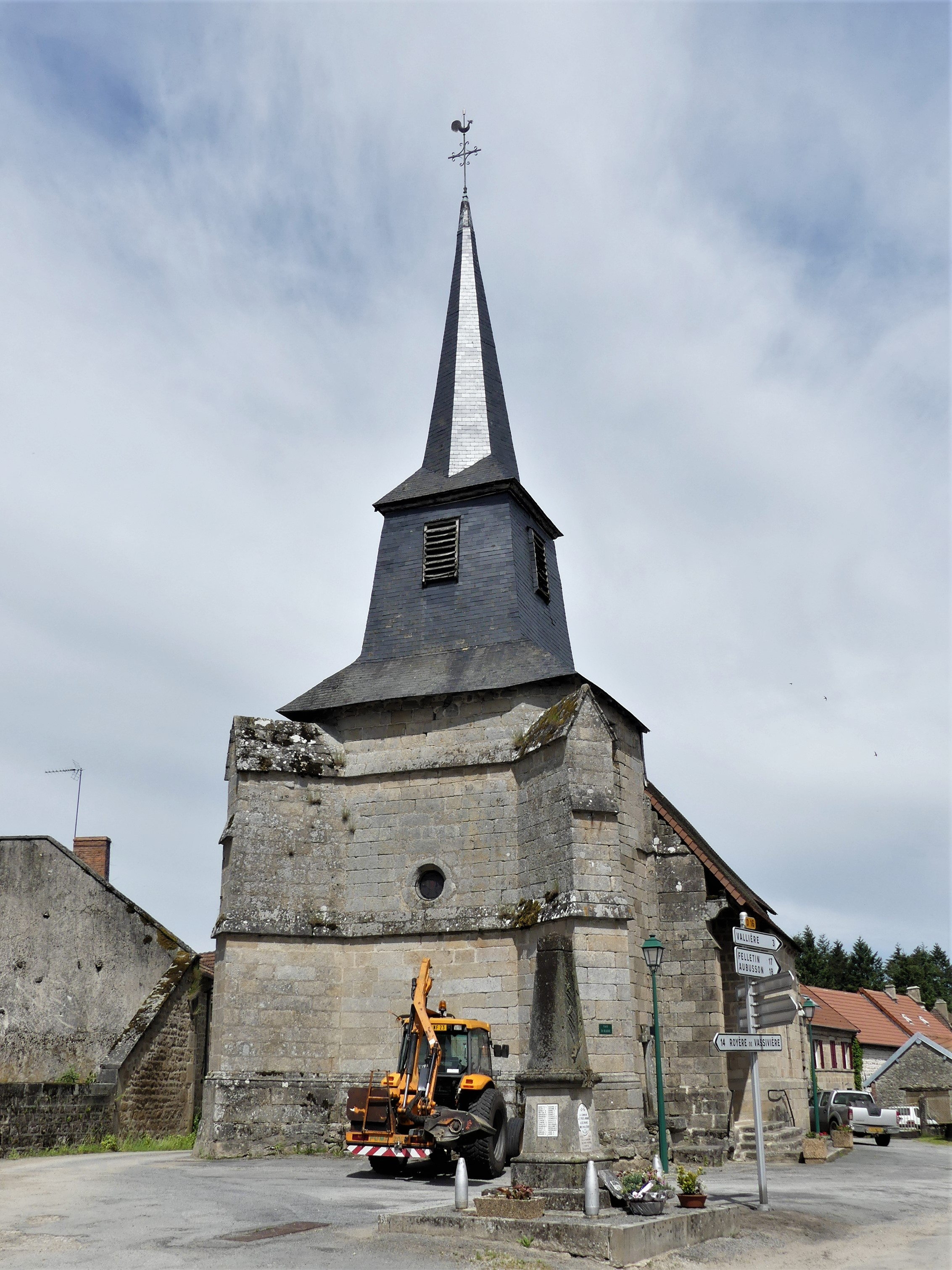 L'église de Saint-Yrieix-la-Montagne, Creuse, France.